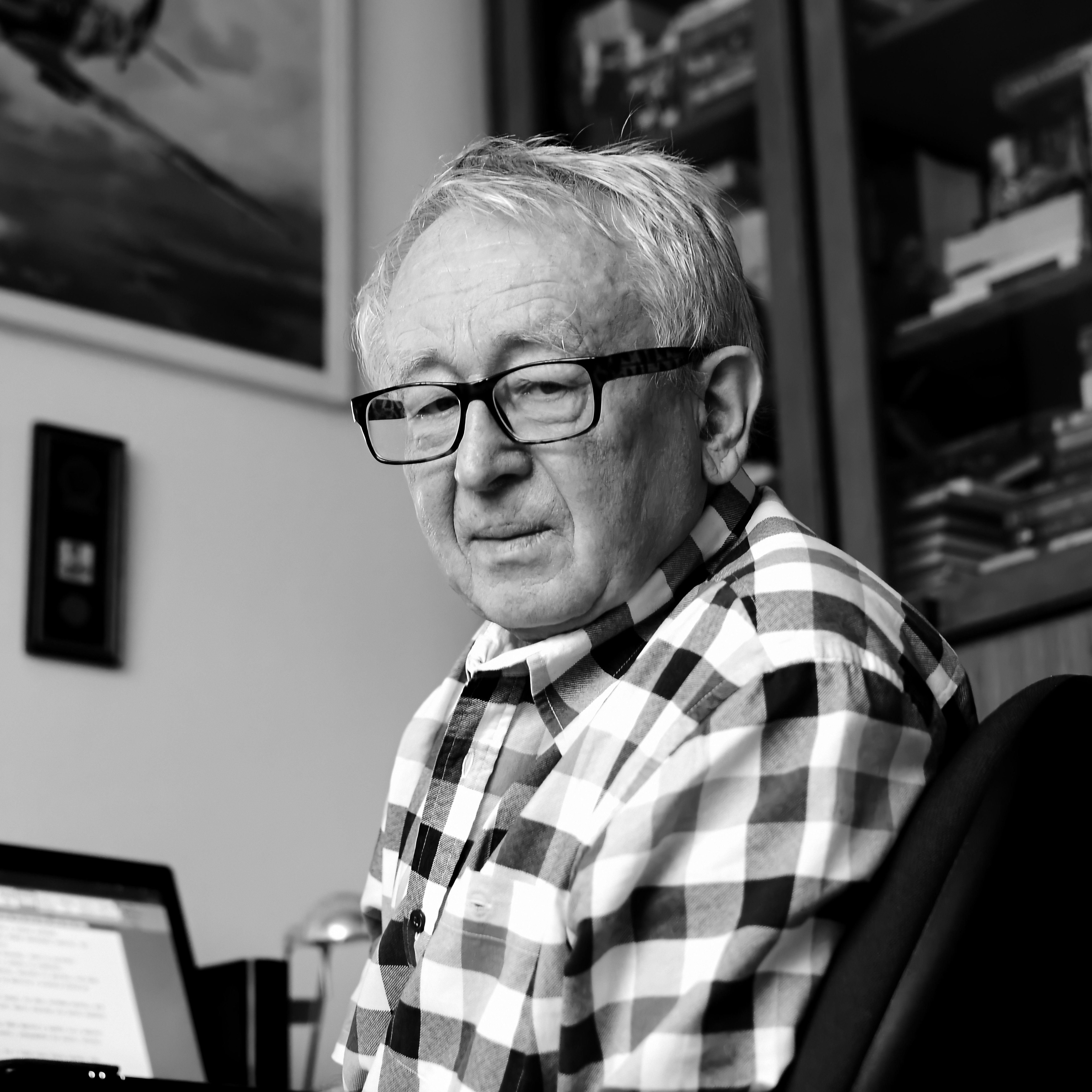 Foto Václava Šorela při práci na jedné z jeho publikací